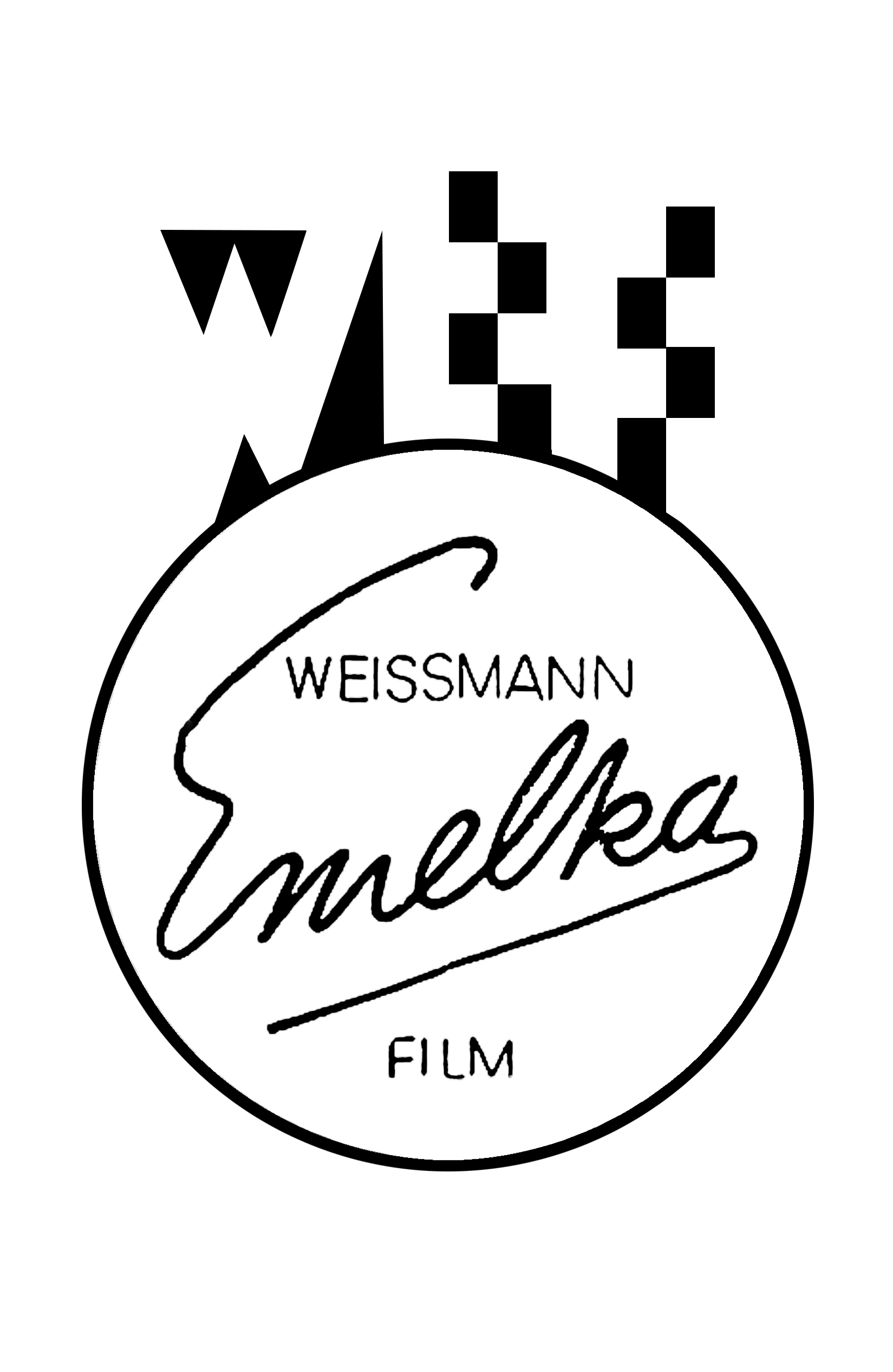 Logo EMELKA Weissmann-Film. Chiel Weissmann (1883-1974) Filmproduzent und Filmverleiher. Schweiz